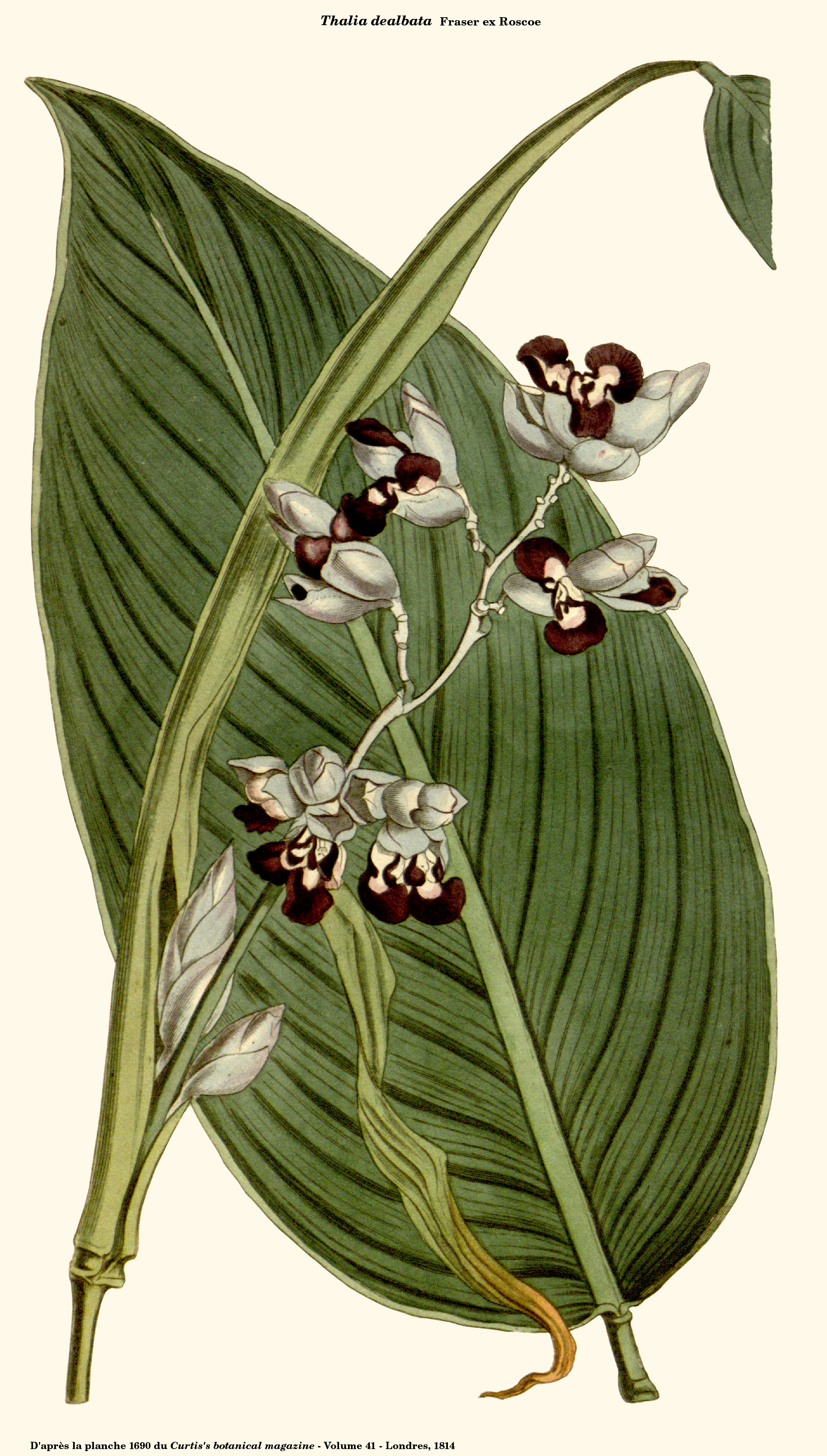 Thalie blanchie - Thalia dealbata - Planche 1690 du Curtis's botanical magazine - Planche reprise sous Gimp par D. Prévôt